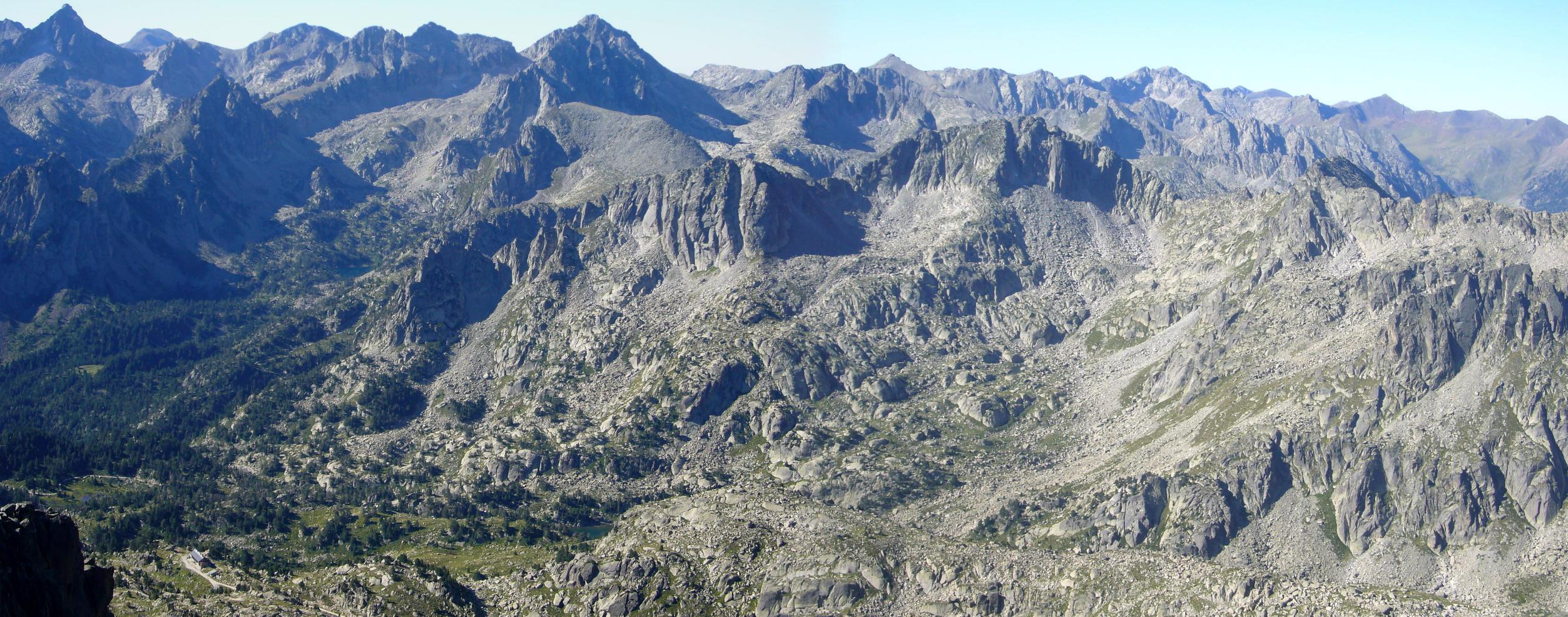 Vall de Subenuix i Coma de Crabes, vistes des del Tuc de Saboredo; Espot, Pallars Sobirà, Catalunya